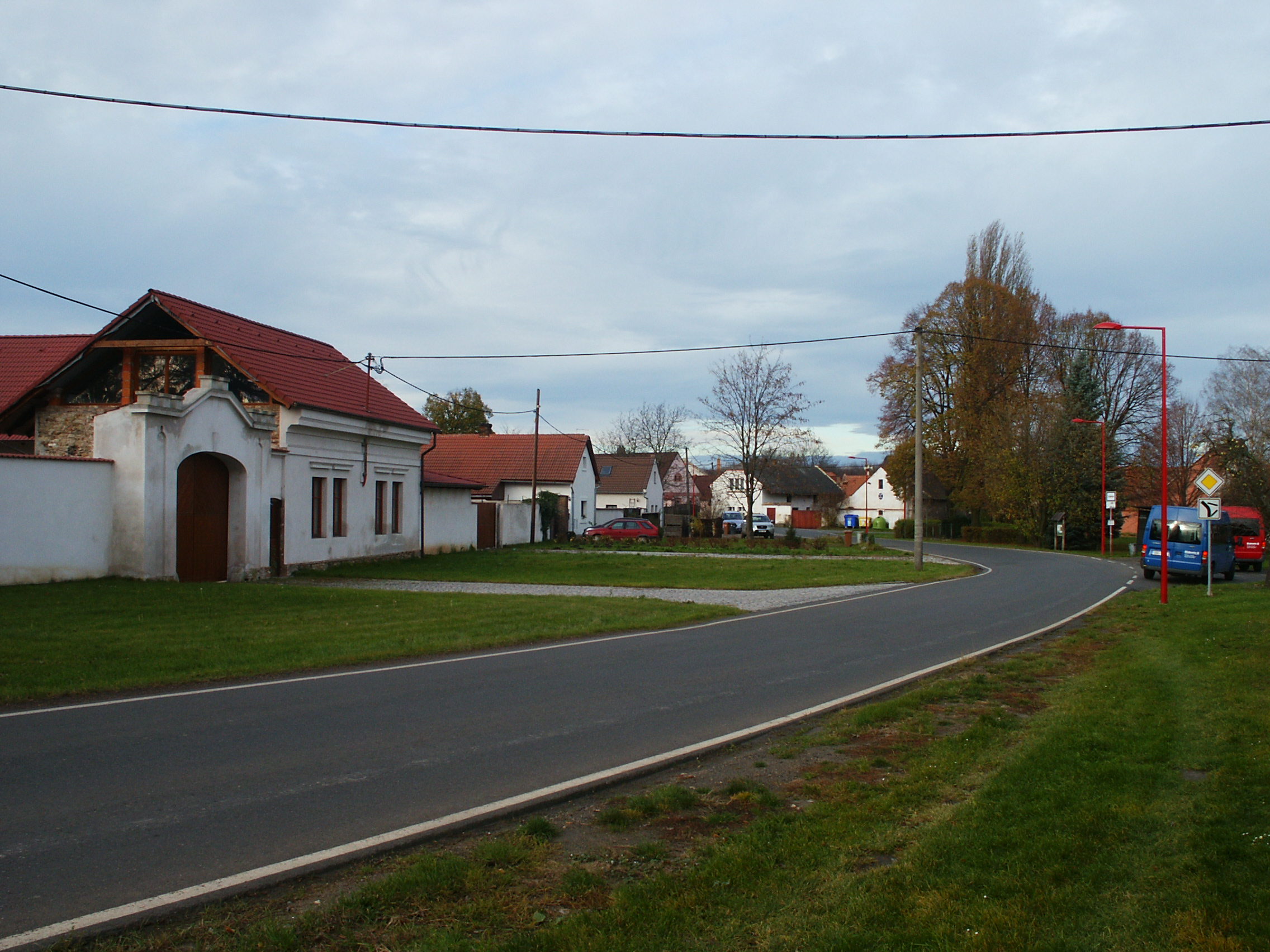 Dolany - náves od východu